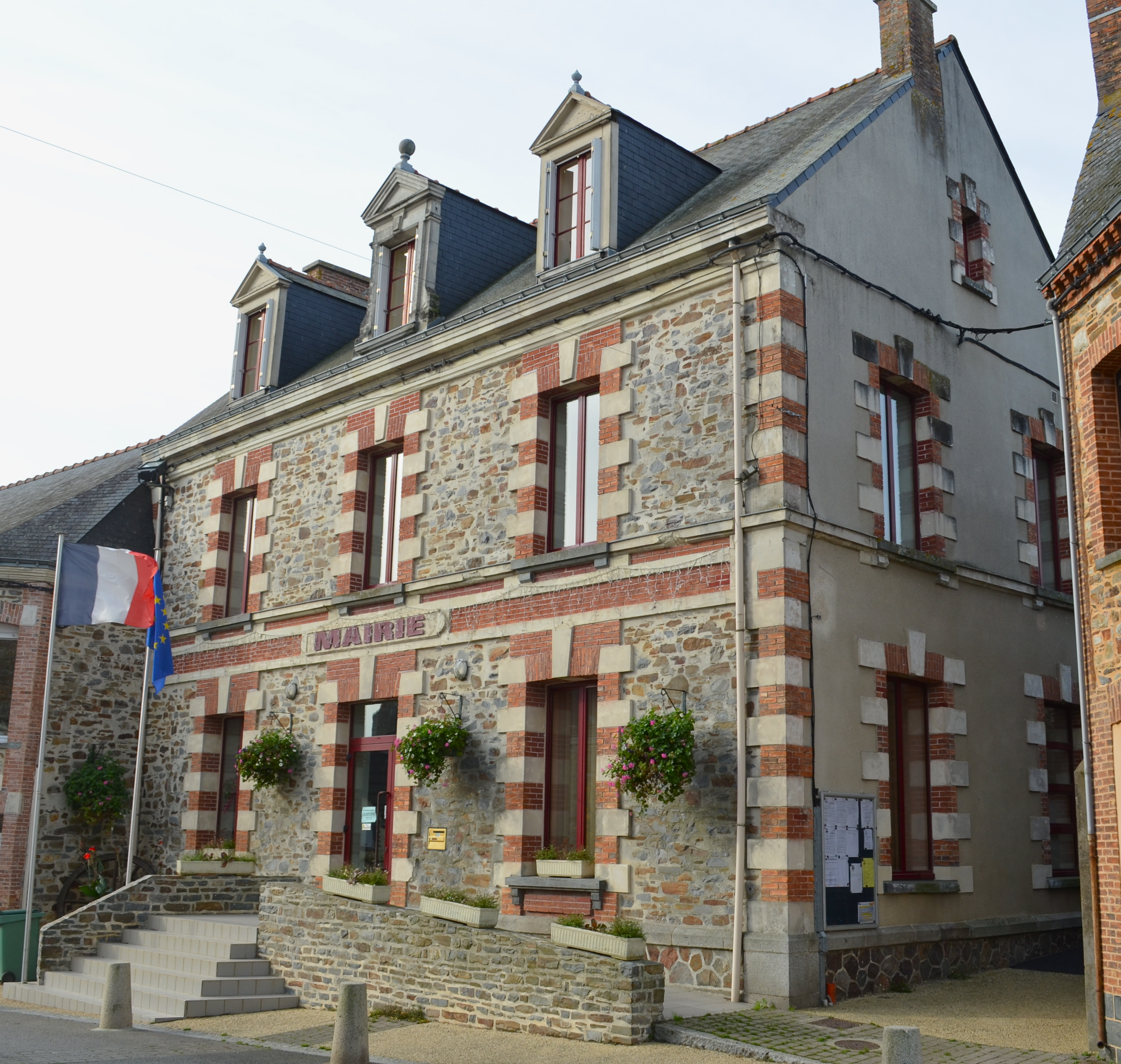 Mairie - Saint-Aubin-des-Châteaux (Loire-Atlantique)